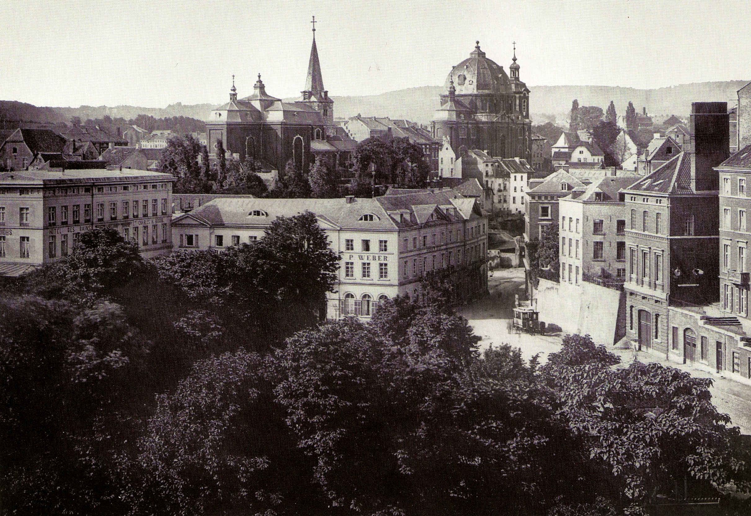 Blick über Burtscheid mit dem Kurpark im Vordergrund, dahinter das Rosen- und Karlsbad und die Burtscheider Kirchen